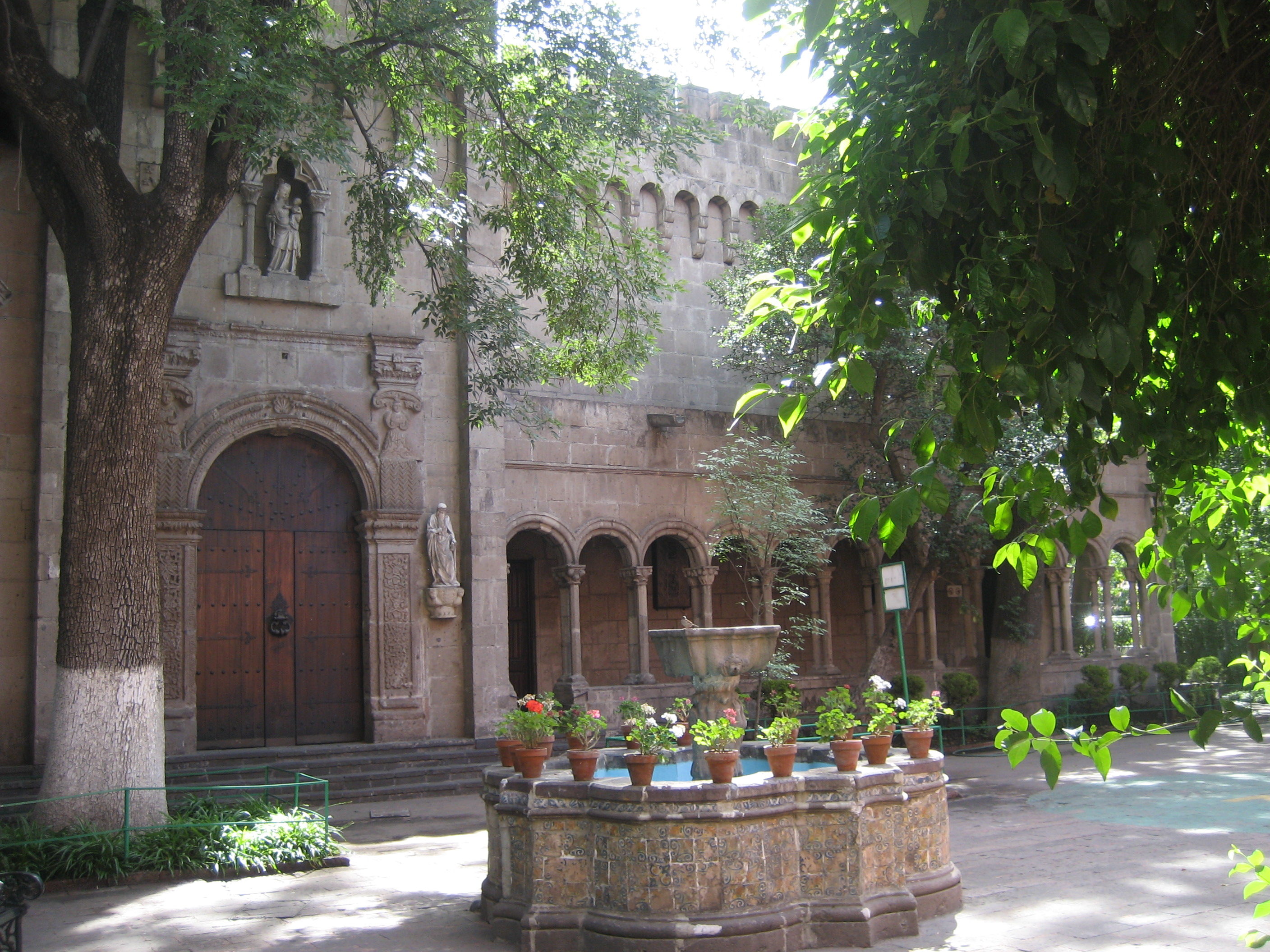 Claustro de la Capilla del Instituto Cultural Helénico